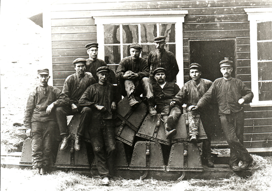 Ni taubanereparatører sitter på en stabel med taubanekibber. Sulitjelma gruber, Fauske. 1900 - 1920 NM.F.008045-00020